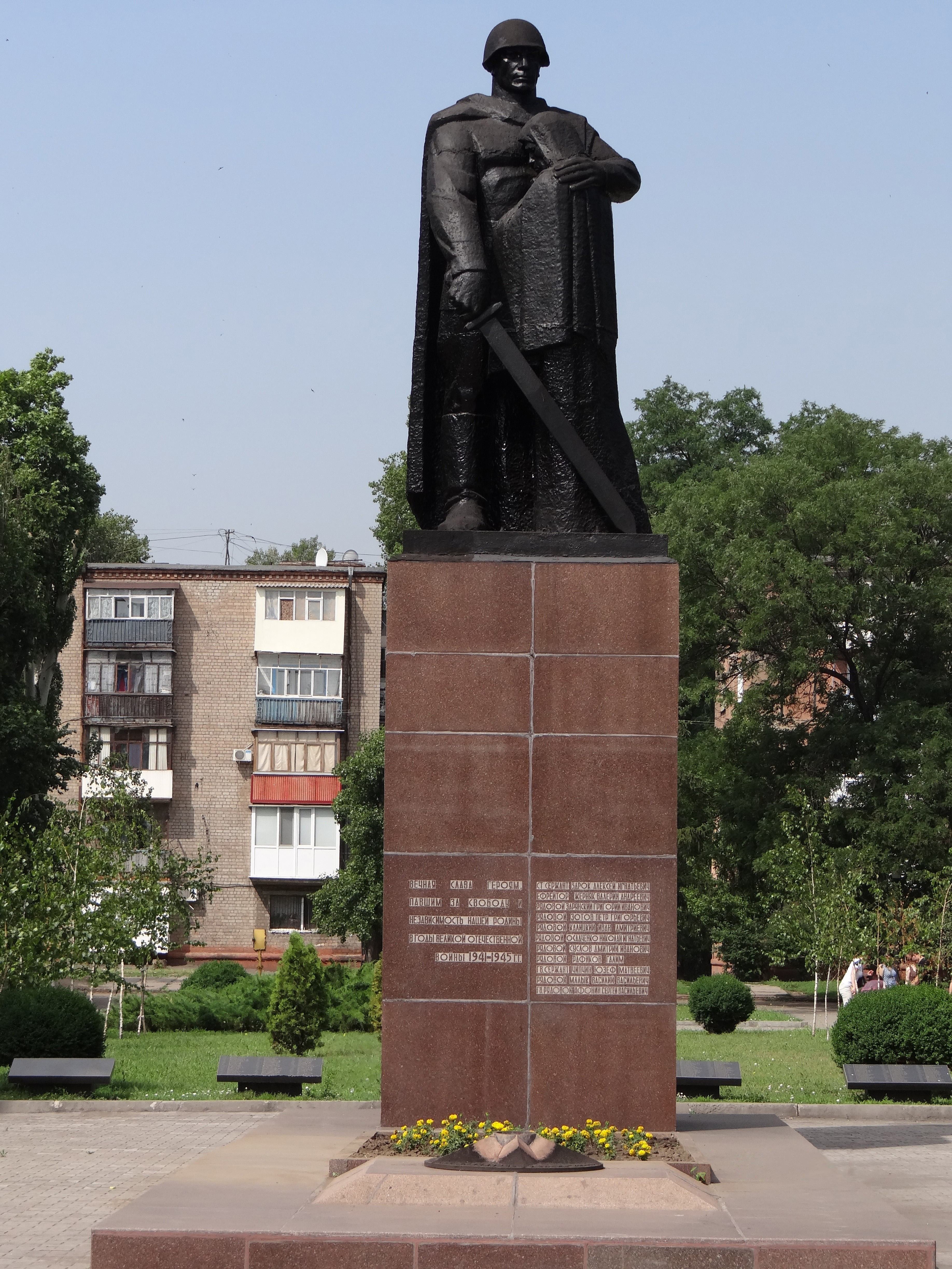 Братська могила радянських воїнів. Надмогильна скульптура воїна, що захищає жінку, парк ВАТ “ПівдГЗК”, проспект Південний